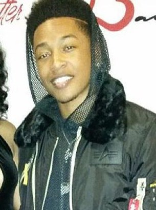 Listening Party